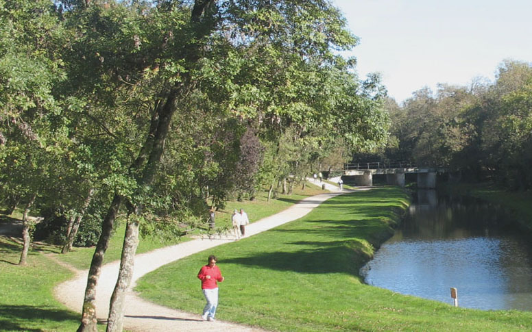 Parc Charruyer, La Rochelle, France